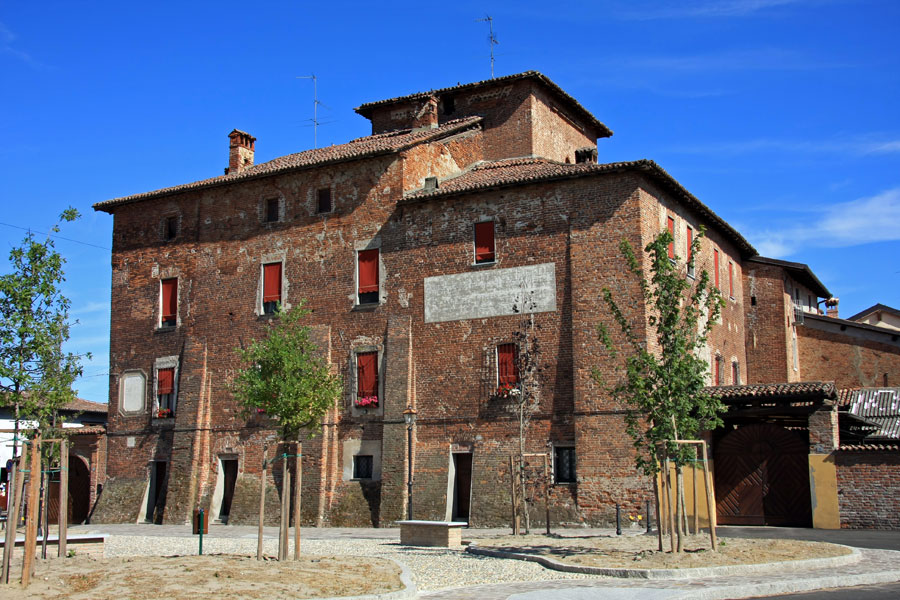 Il castello di Alagna (PV)